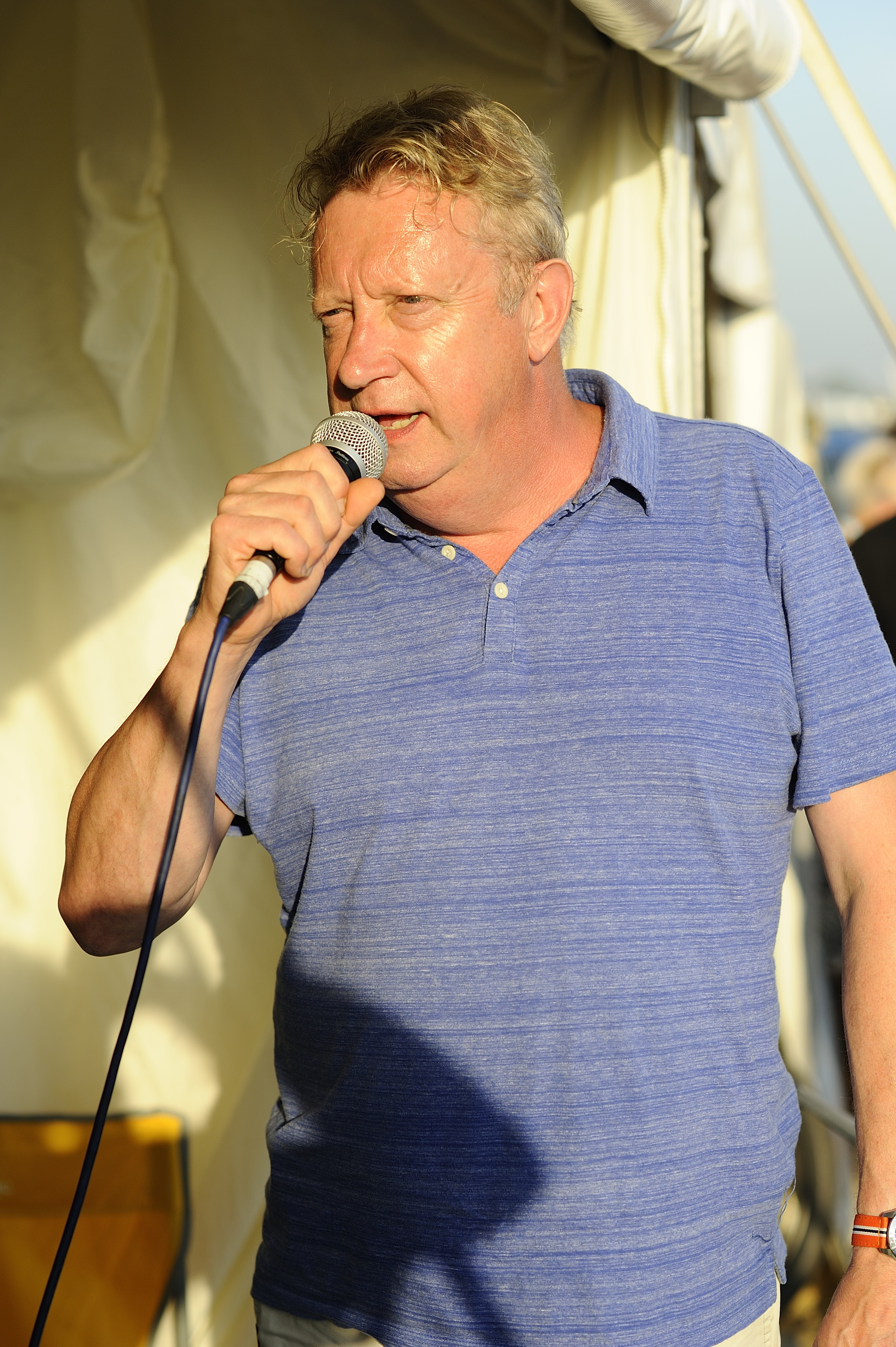 Mark Williams au Brighton Big Beach Screen Event 2017